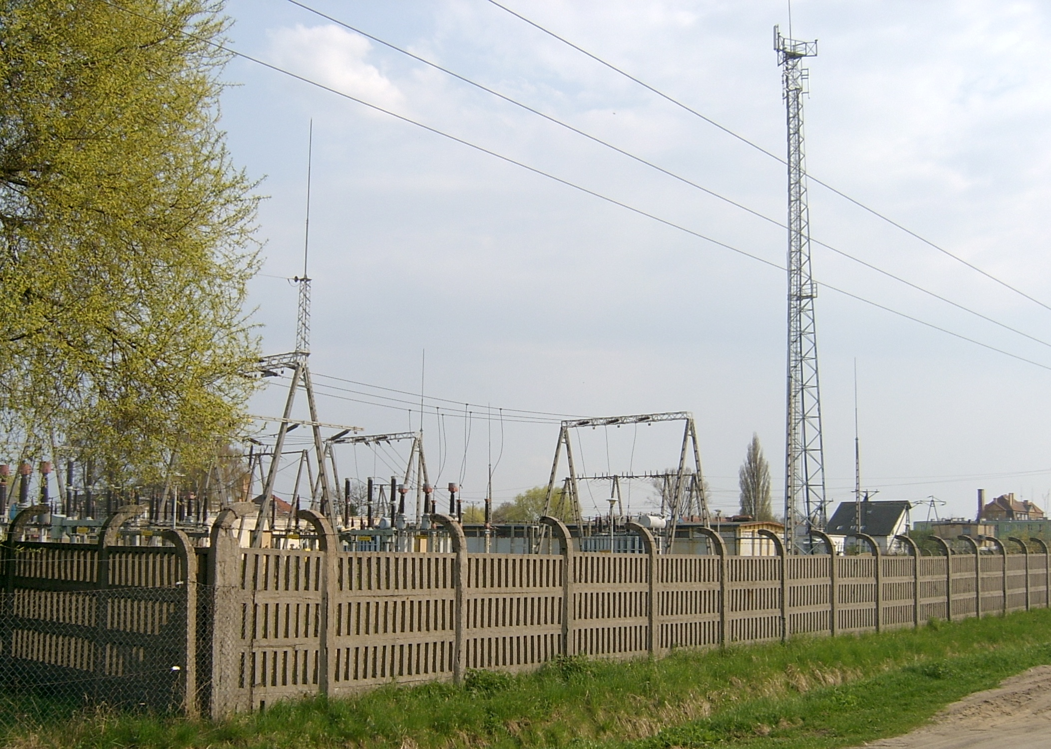 podstacja transformatorowa w Słubicach